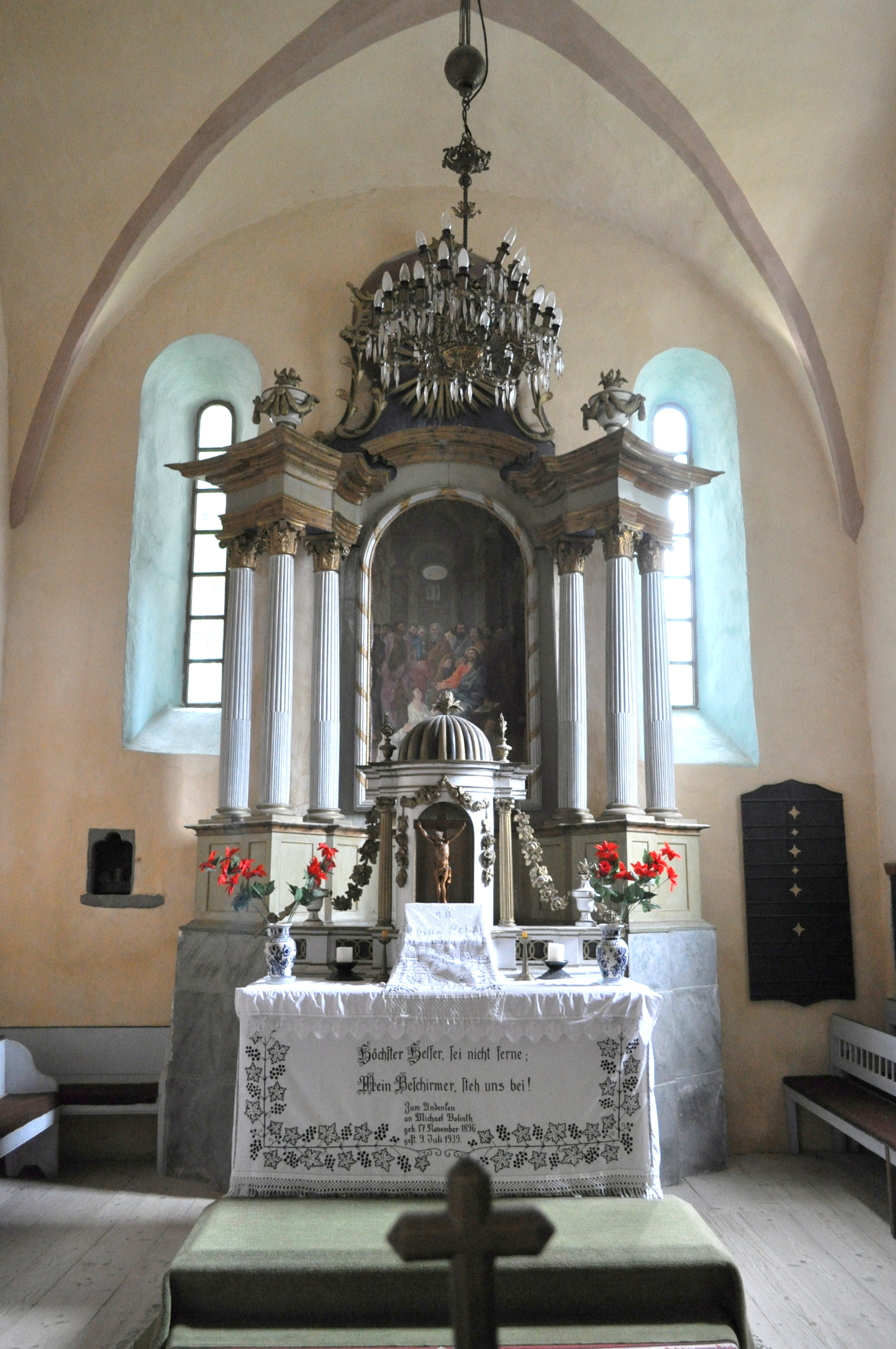 Biserica evanghelică fortificată, sat BAZNA; comuna BAZNA, județul Sibiu 01